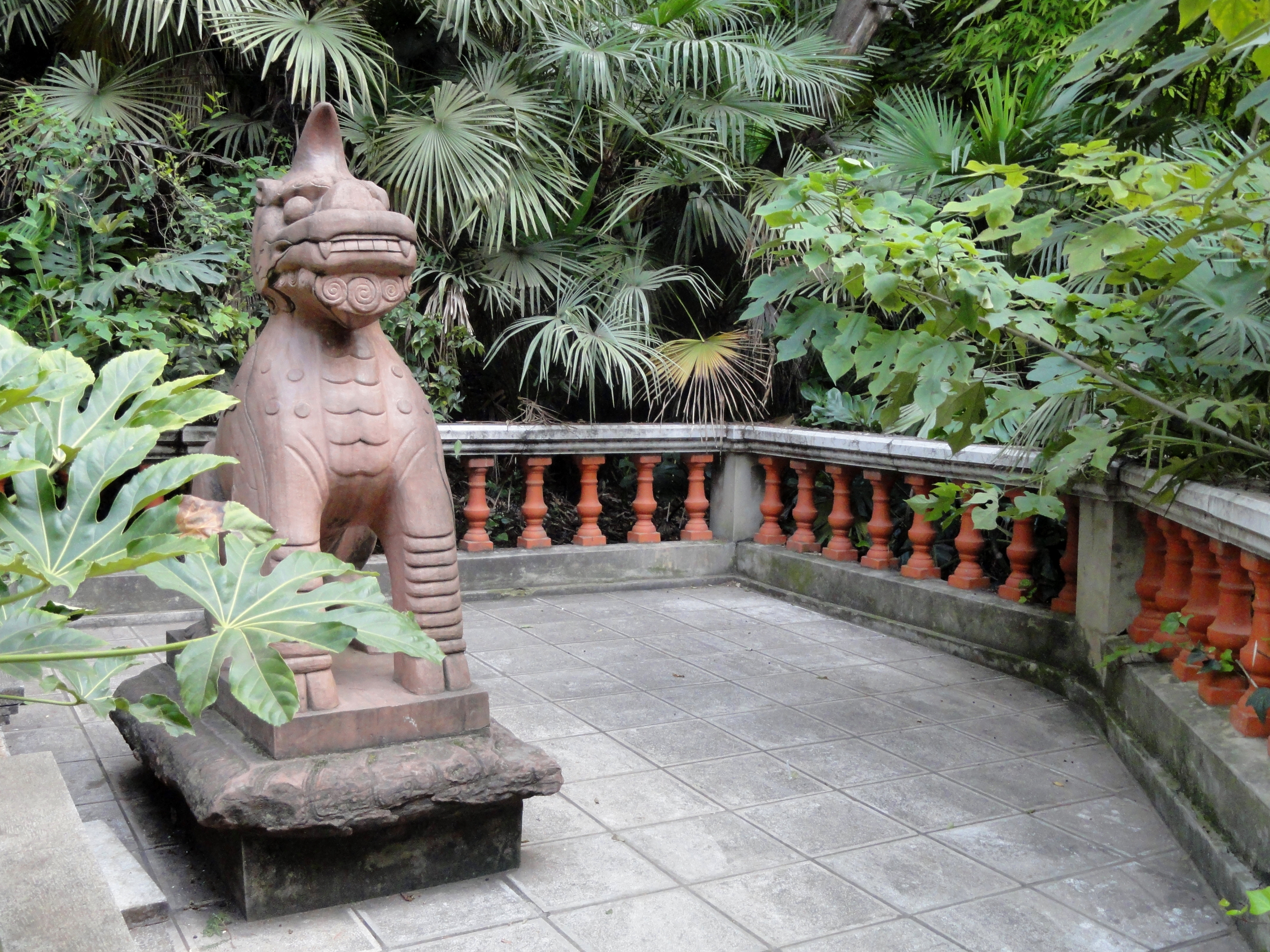 Yunnan University, Kunming, Yunnan, China.